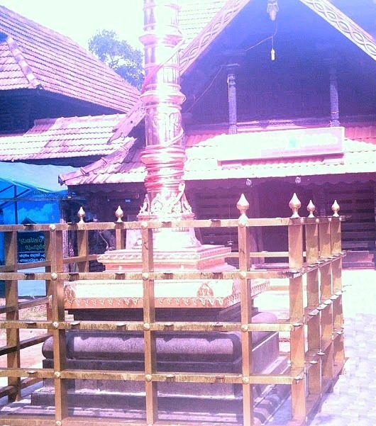 കിഴക്കേനട, പാഴൂർ പെരുംതൃക്കോവിൽ, പിറവം